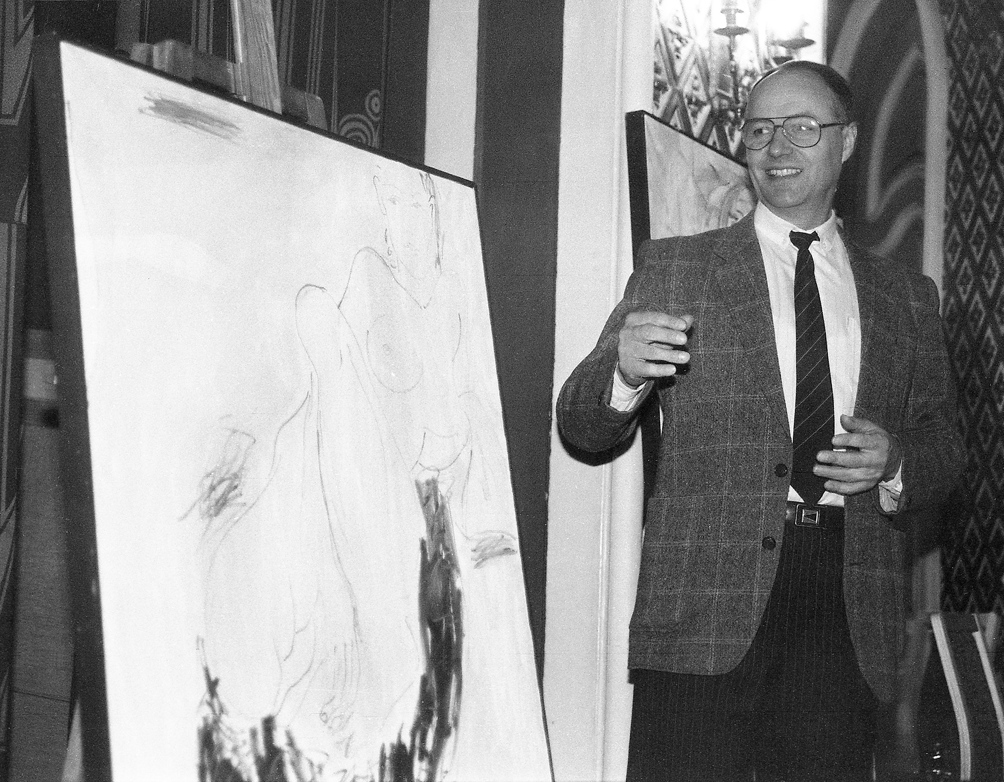 Paul Allik kunstnik ja laulja 94